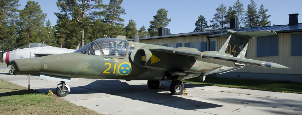 Saab SK 60C vid Flygmuseet F 21 i Luleå. Flygplan (S/N 60004) levererades till Flygvapnet år 1966, och tjänstgjorde på F 5, FC och F 21. Vid F 21 tjänstgjorde den som flygplan "F 21-17" för fotospaning fram till år 2005, då det togs ur tjänst och kasserades med en total flygtid på 3800 timmar. Flygplanet är ett tvåsitsigt skolflygplan med en framdragen nos med panoramakamera och IR-sökare.